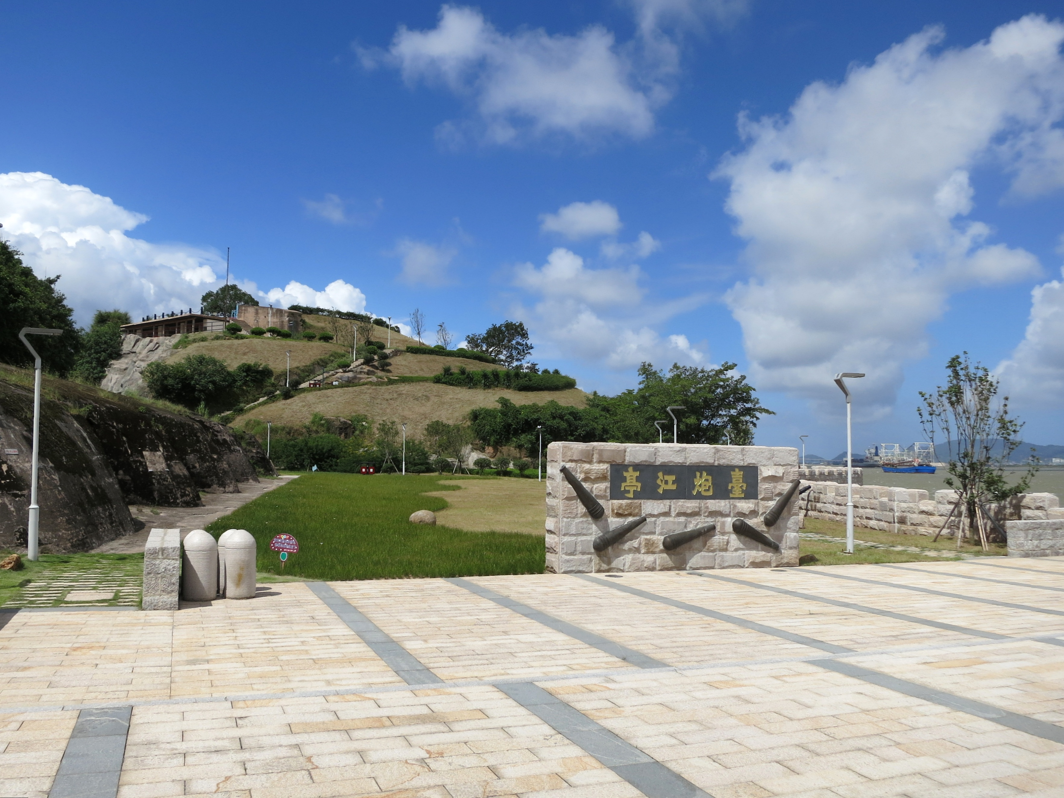 亭江炮台 - Tingjiang Fort - 2015.08